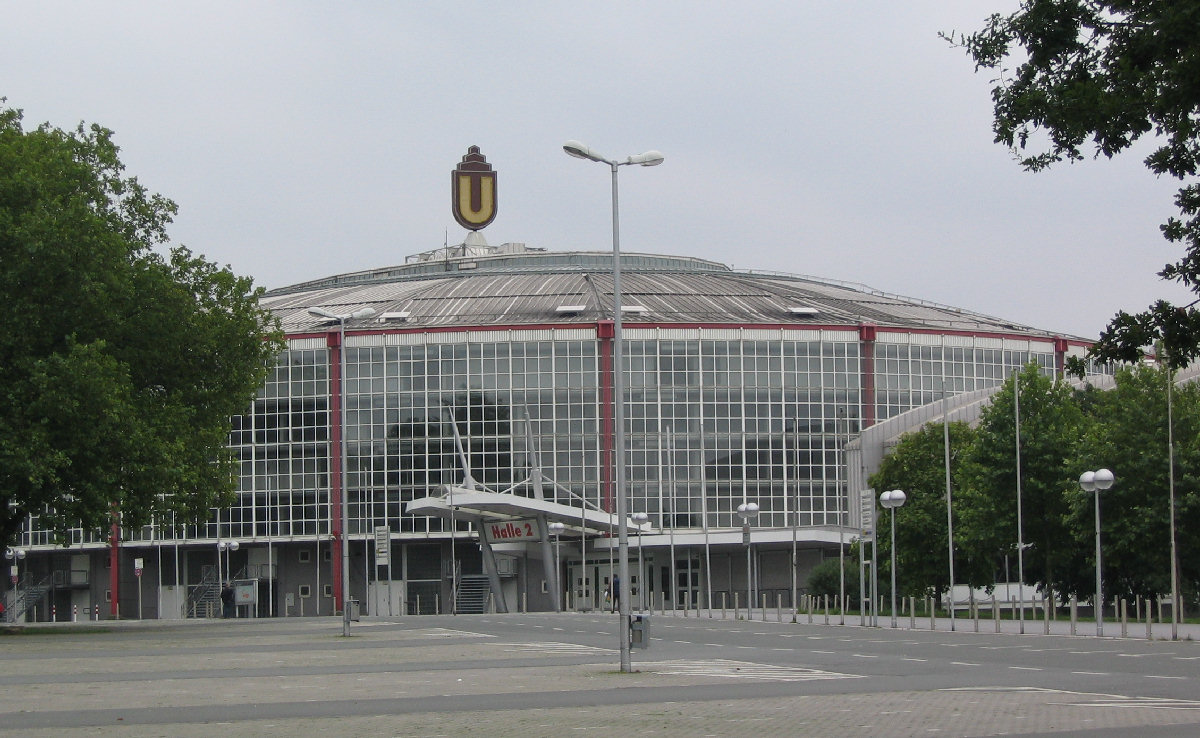 Westfalenhalle I und II Dortmund, nordwestliche Ansicht